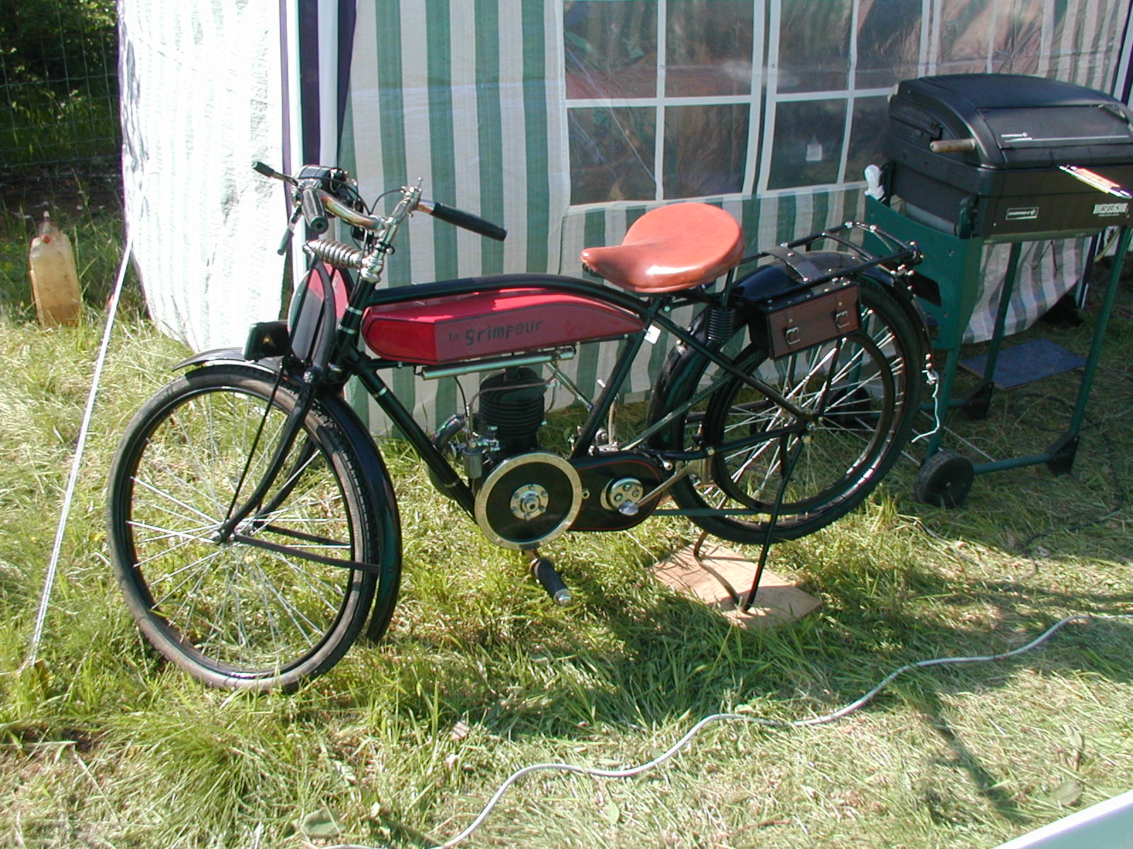 Old Le Grimpeur motrocycle Picture : Gérard Delafond